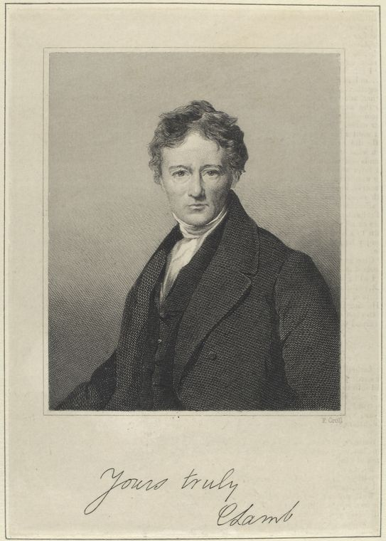 Charles Lamb, Literato e Crítico inglês